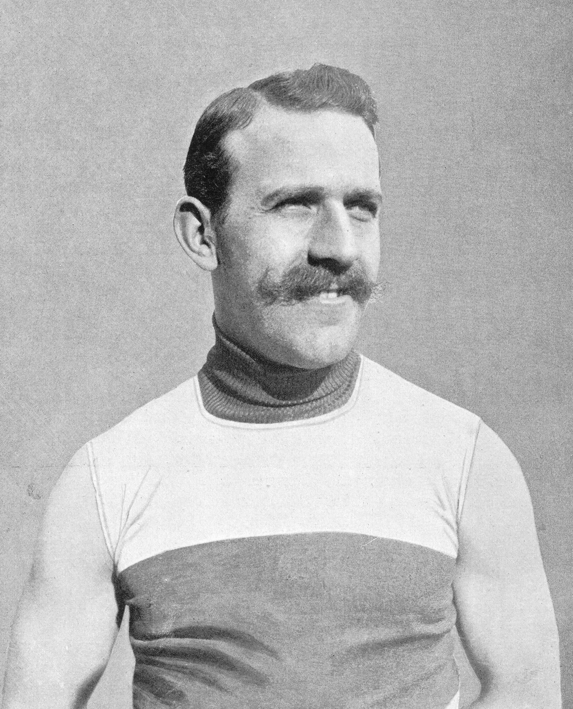 Harrie Meyers, niederländischer Radrennfahrer